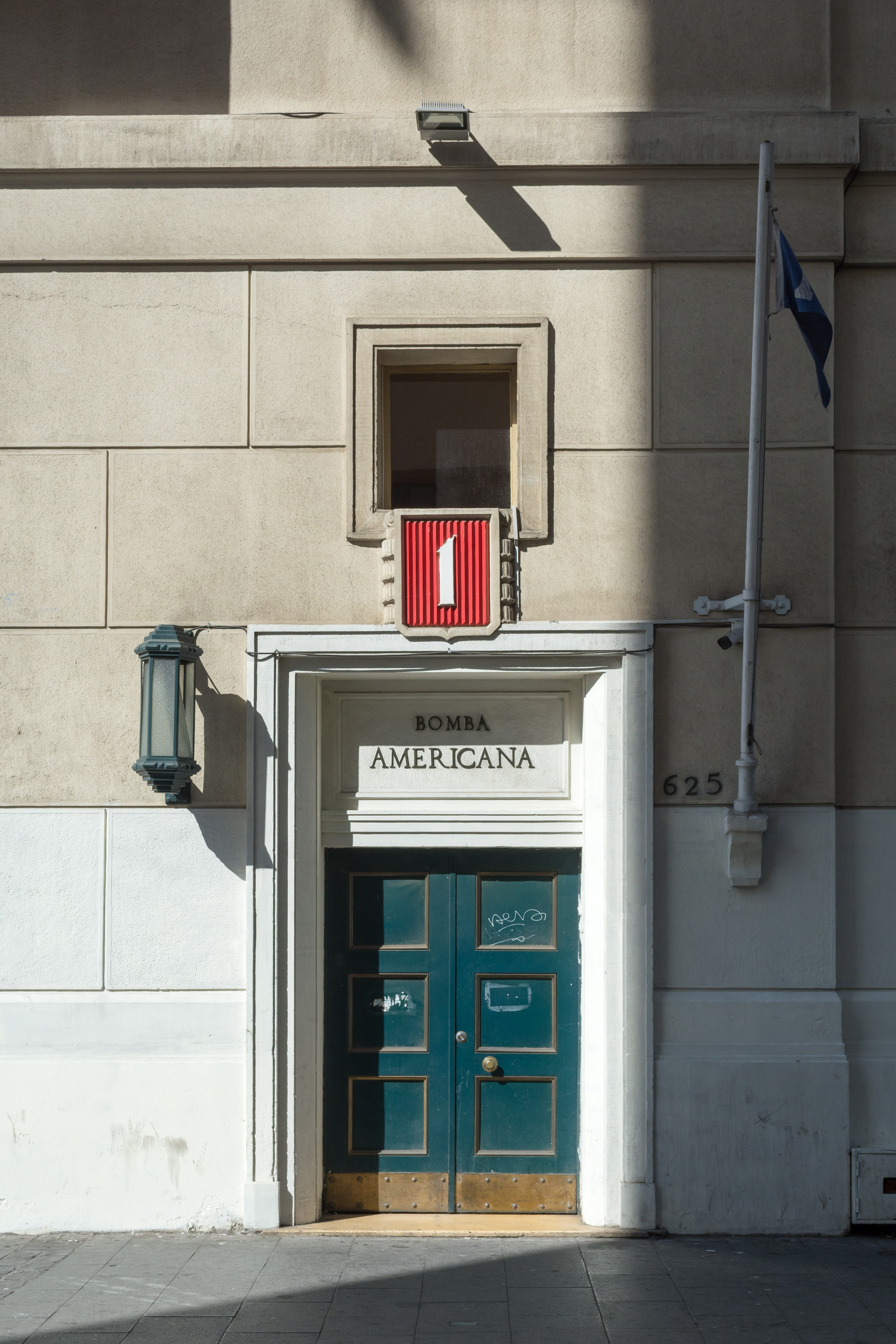 Bomba Americana, Valparaíso, Región de Valparaíso, Chile